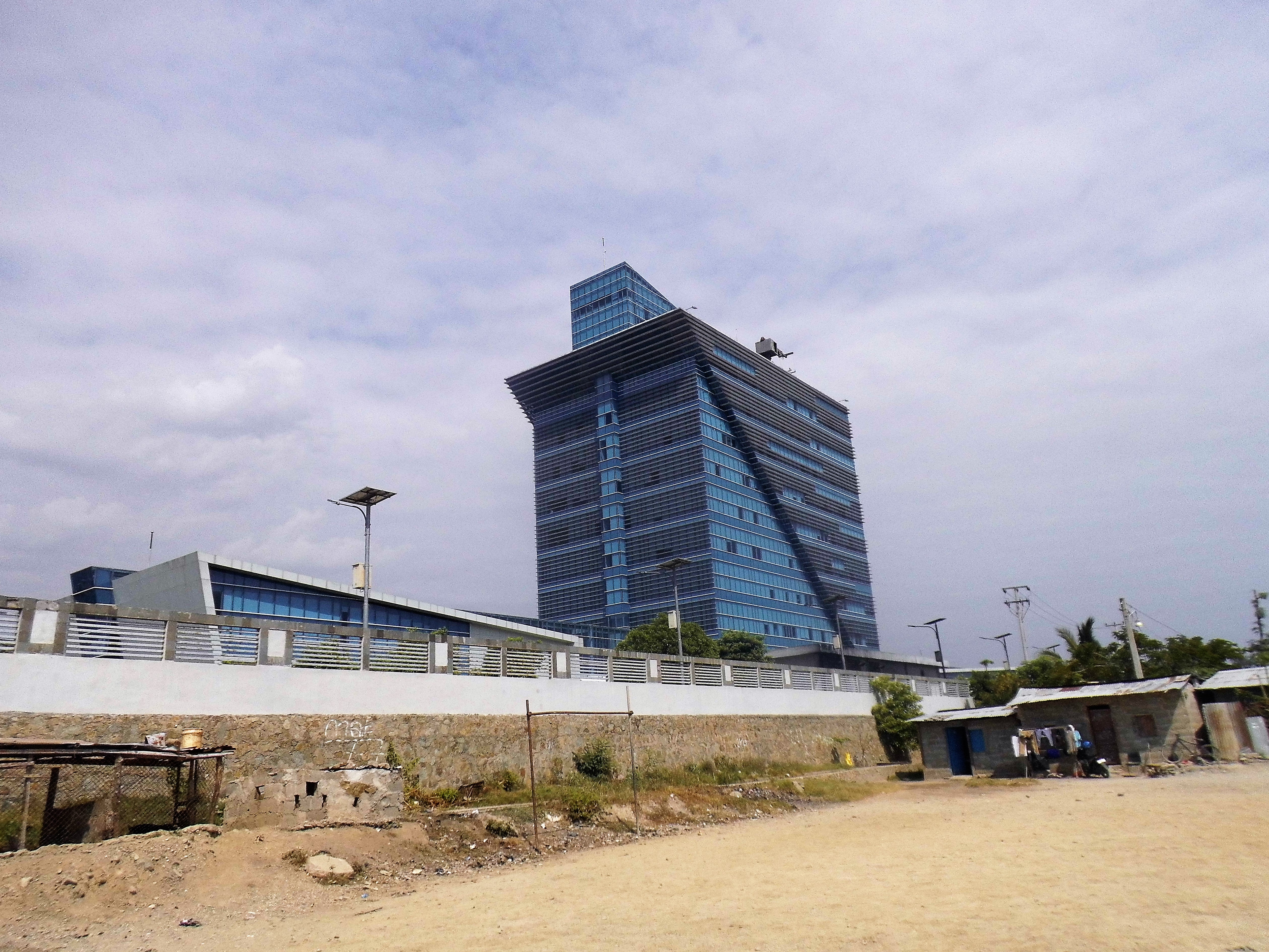 Finanzministerium, Dili, Osttimor